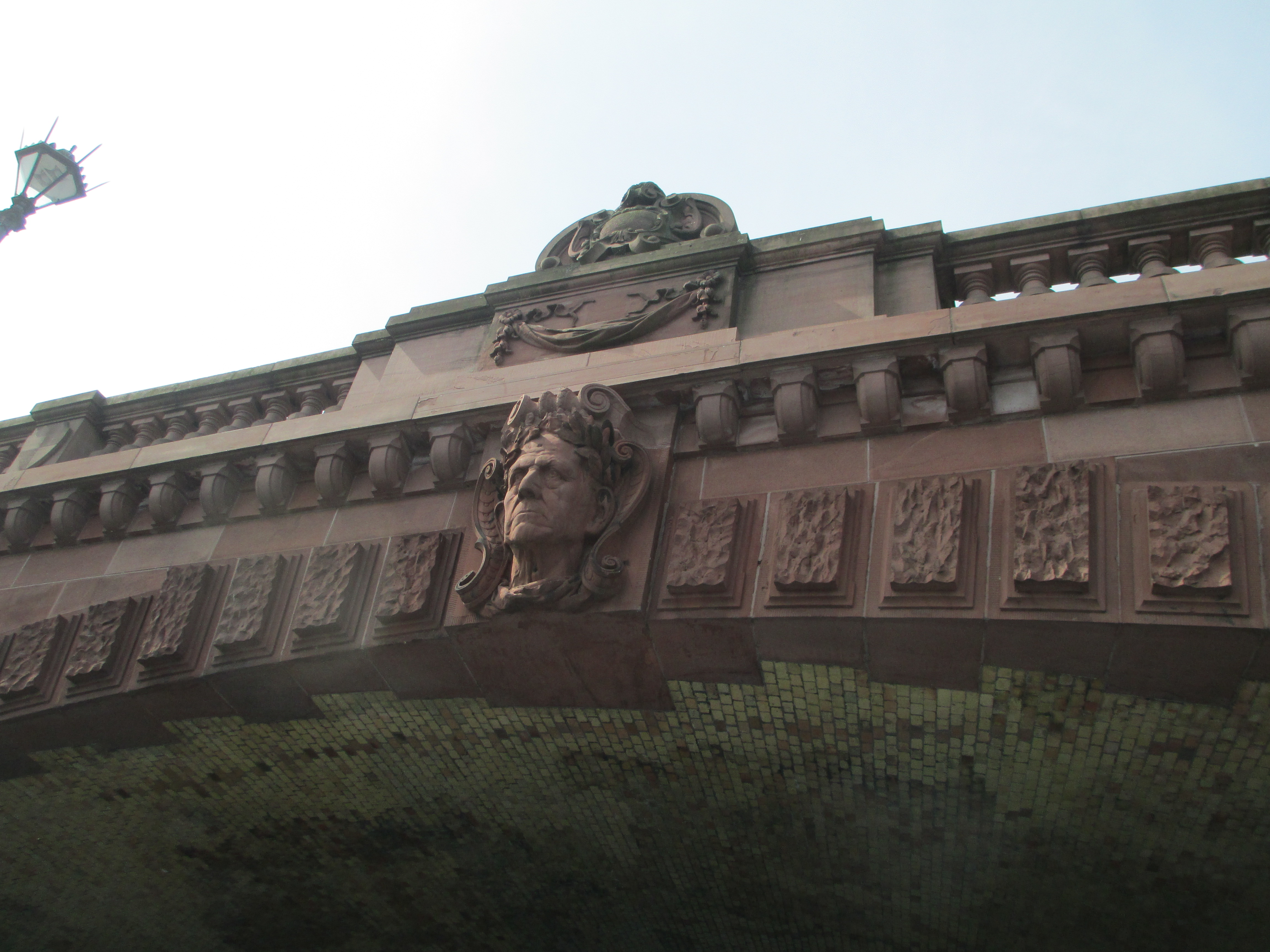 תבליט של הלמוט פון מולטקה הזקן בגשר מולטקה